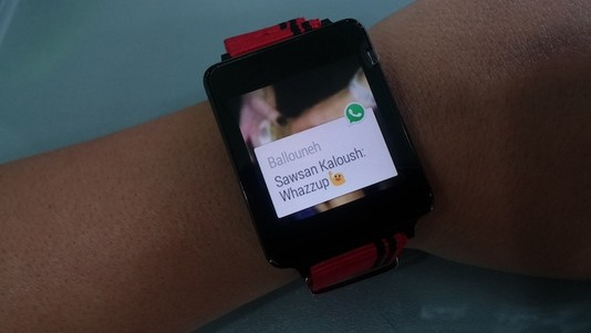 Android Wear Ekran Görüntüsü 2